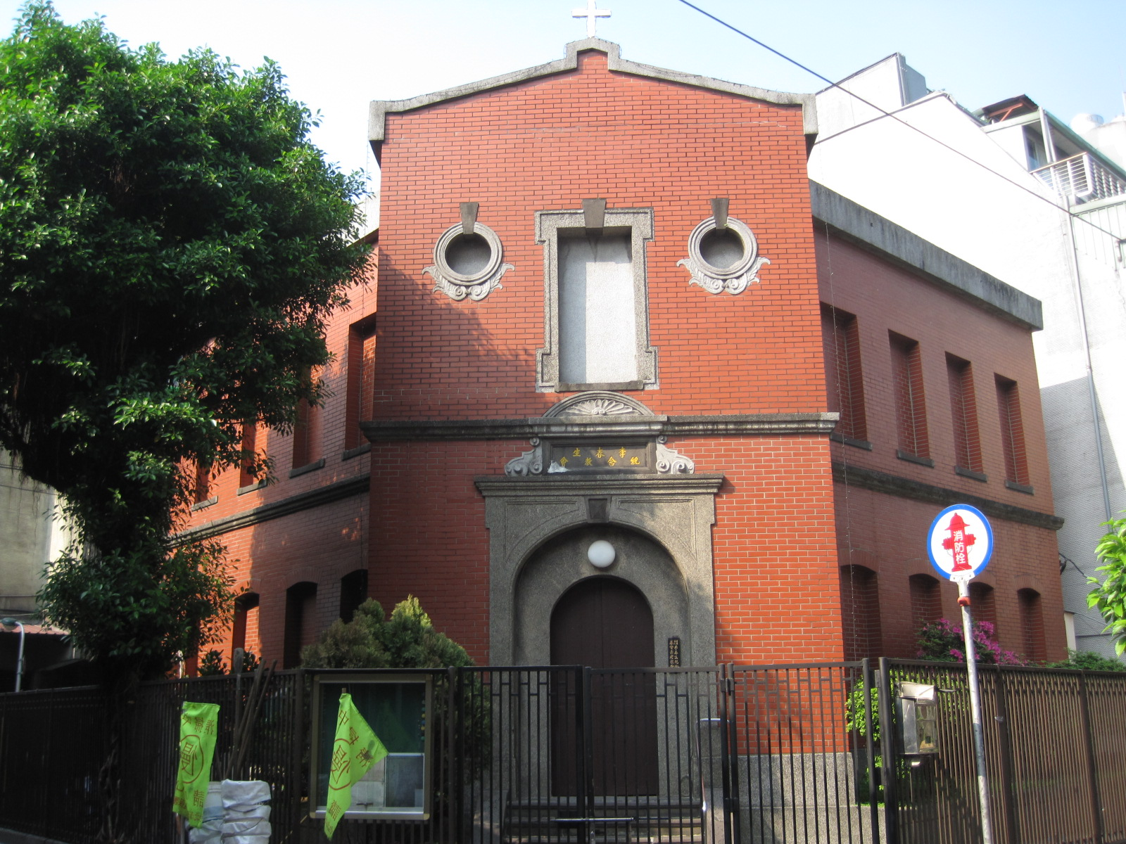 台灣基督長老教會李春生紀念教會。